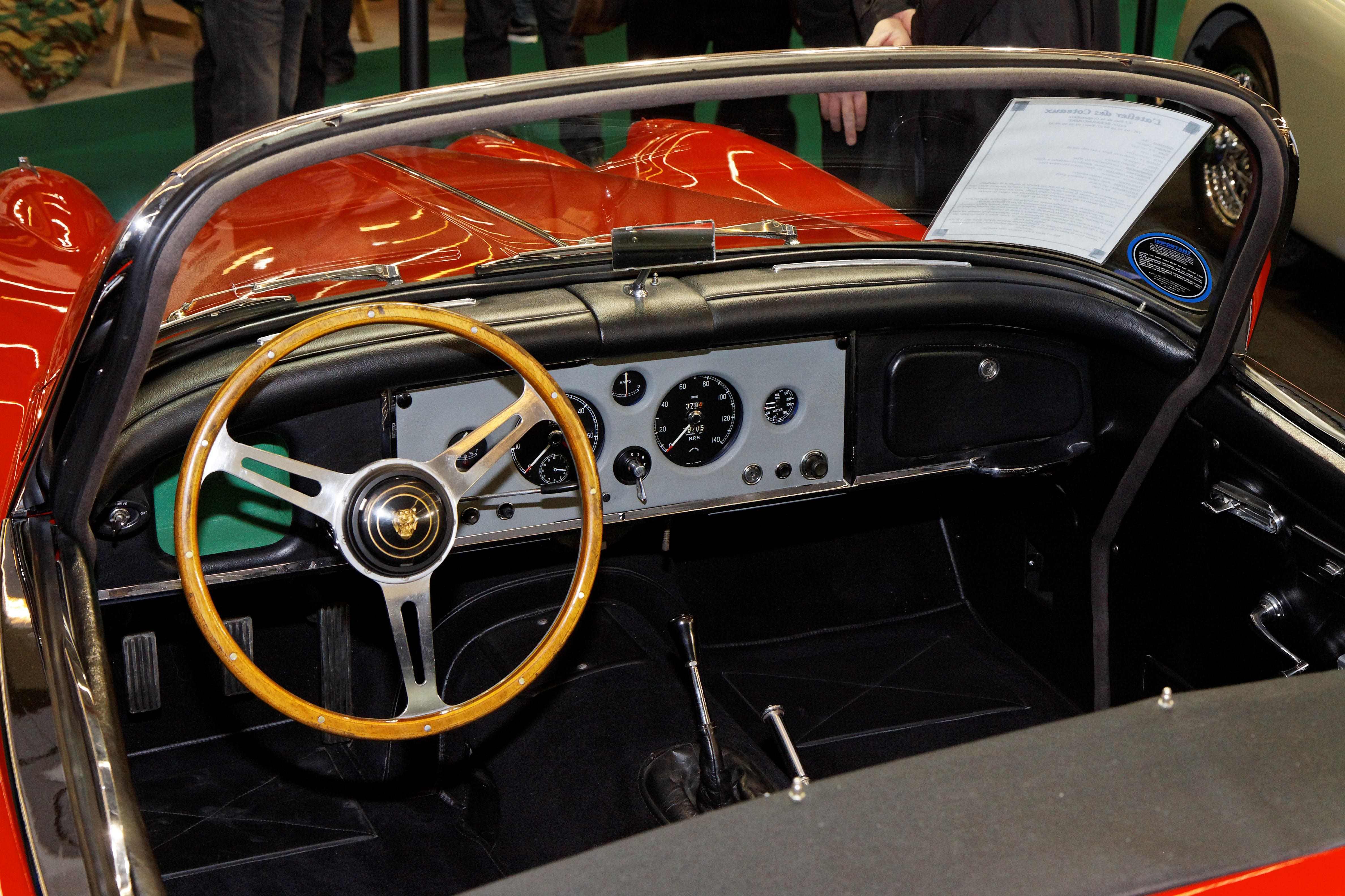 Photographie prise lors du salon rétromobile 2011 à Paris, porte de Versailles.